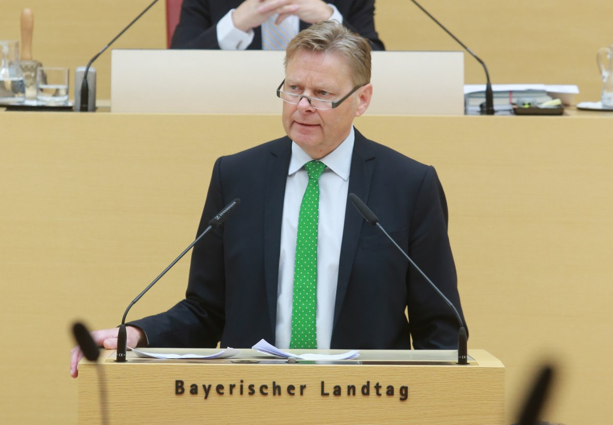 Norbert Dünkel, deutscher Politiker (CSU). Hier am 18. Mai 2017 im Bayerischen Landtag (während der Aktuellen Stunde zum Thema "Der Sicherheit verpflichtet - für eine erfolgreiche Sicherheitspolitik") Titel des Werks: "Norbert Dünkel (CSU) am 18.05.2017, Rede im Bayerischen Landtag"